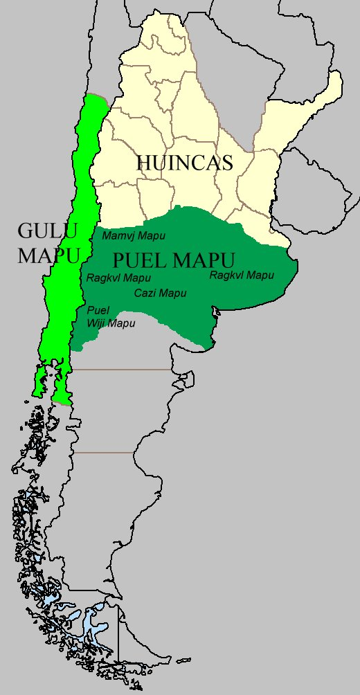 Puel Mapu . Identidades territoriales. Siglo XIX. Fuentes: José Quidel y Víctor Caniullan (2002), Las identidades territoriales. Bases y Fundamentos desde una perspectiva del conocimiento Mapunche, citado en La reforma agraria y las tierras mapuches: Chile 1962-1975 (2005) de Martín Correa, Raúl Molina Otárola y Nancy Yáñez Fuenzalida, Santiago, LOM Ediciones, ISBN 9562827097, página 18. Comision de Trabajo Autónomo Mapuche (2003), Informe de la Comisión Verdad Histórica y Nuevo Trato 2003, Volumen III, Tomo II, Capítulo II Territorio y Tierras Mapuche, "Procesos territoriales en el mapunche wajontu mapu: prehistoria y resistencia anticolonial (siglo XVI – XVIII)". Equipo Mapuche, La Conquista del Desierto: fue una guerra genocida contra Nación Mapuche en Argentina